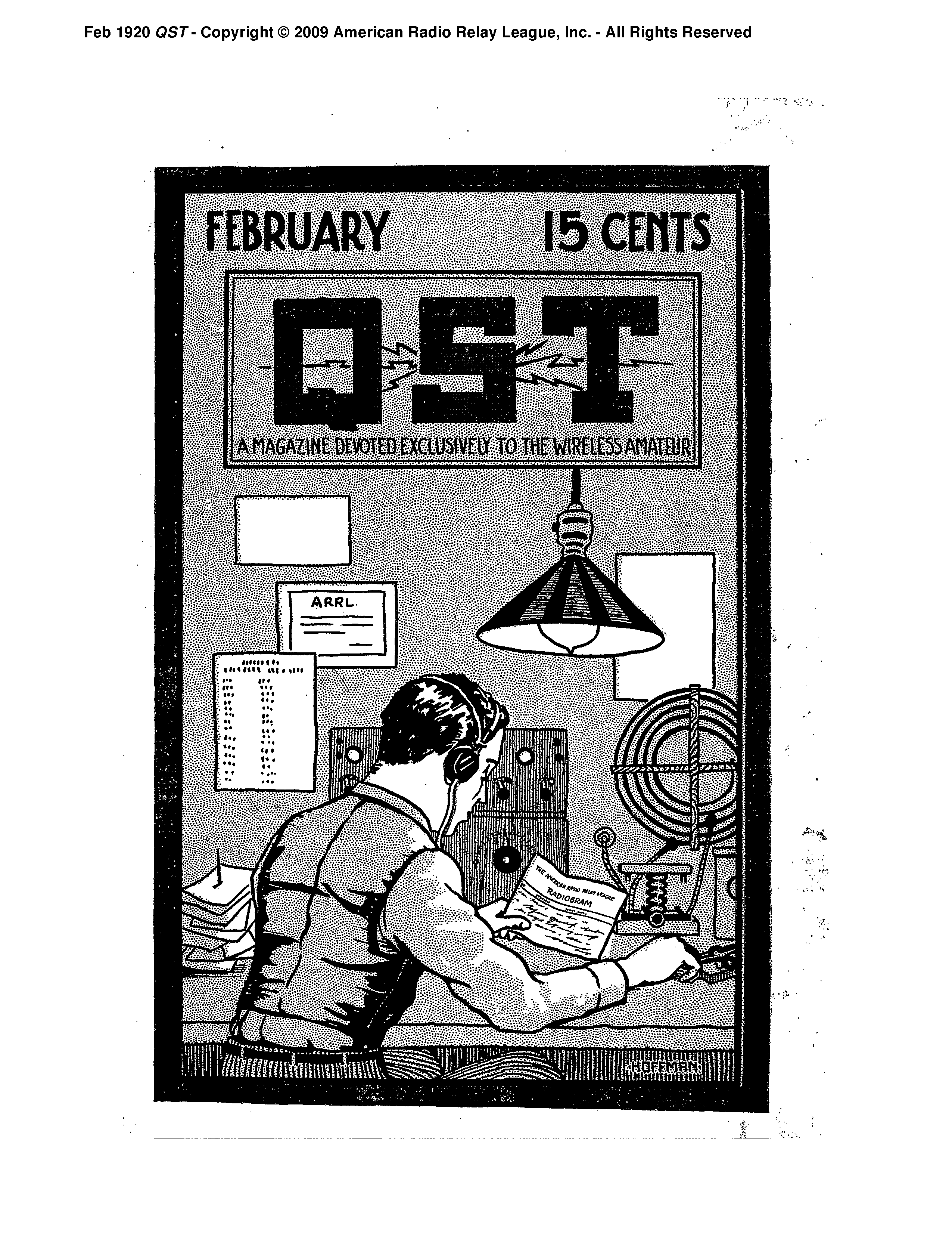 Обложка журнала QST за февраль 1920 г.